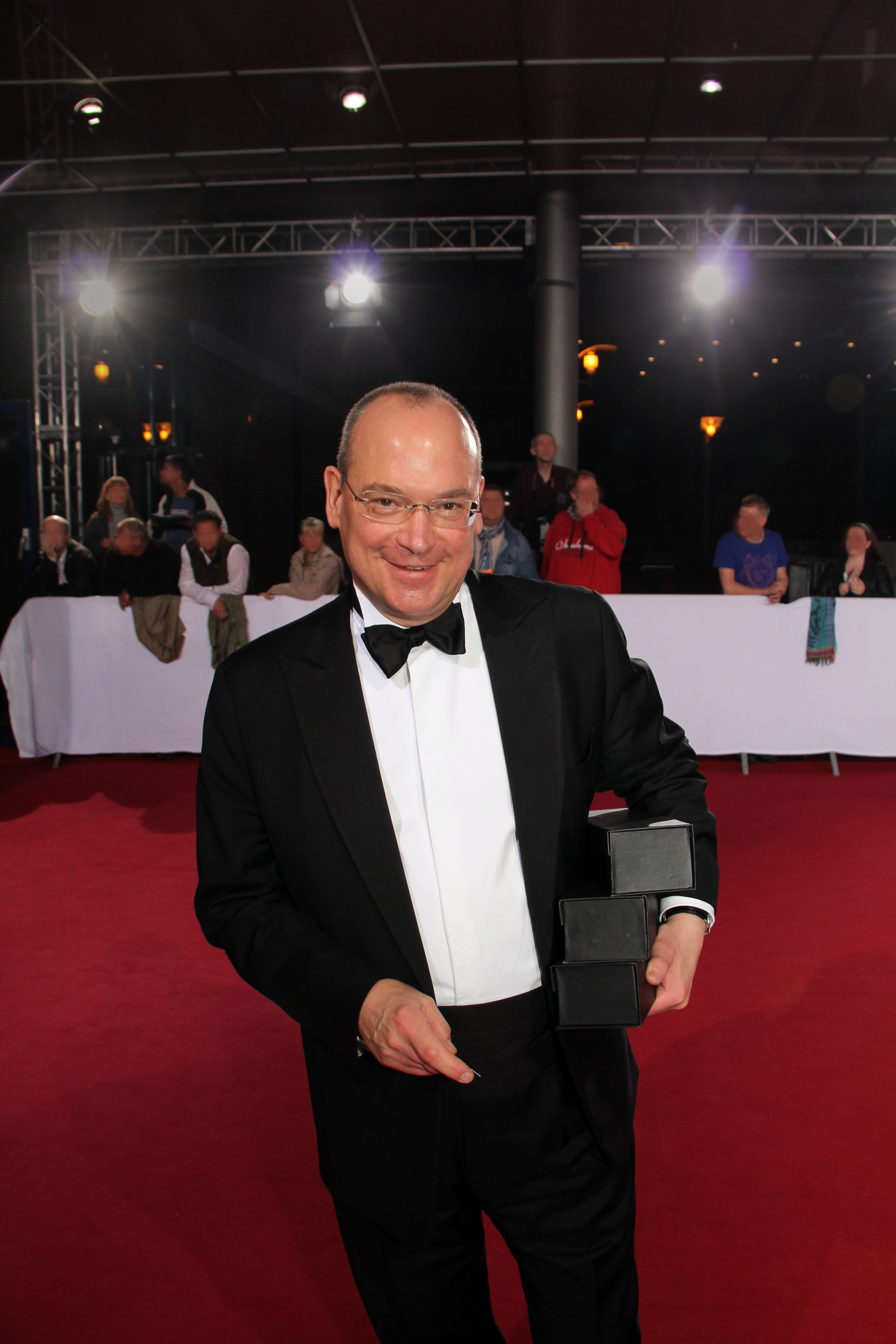 Preisträger Thomas Schreiber (Programmleiter Fiktion & Unterhaltung beim NDR-Fernsehen sowie ARD-Unterhaltungskoordinator) beim Deutschen Fernsehpreis 2011 in Köln